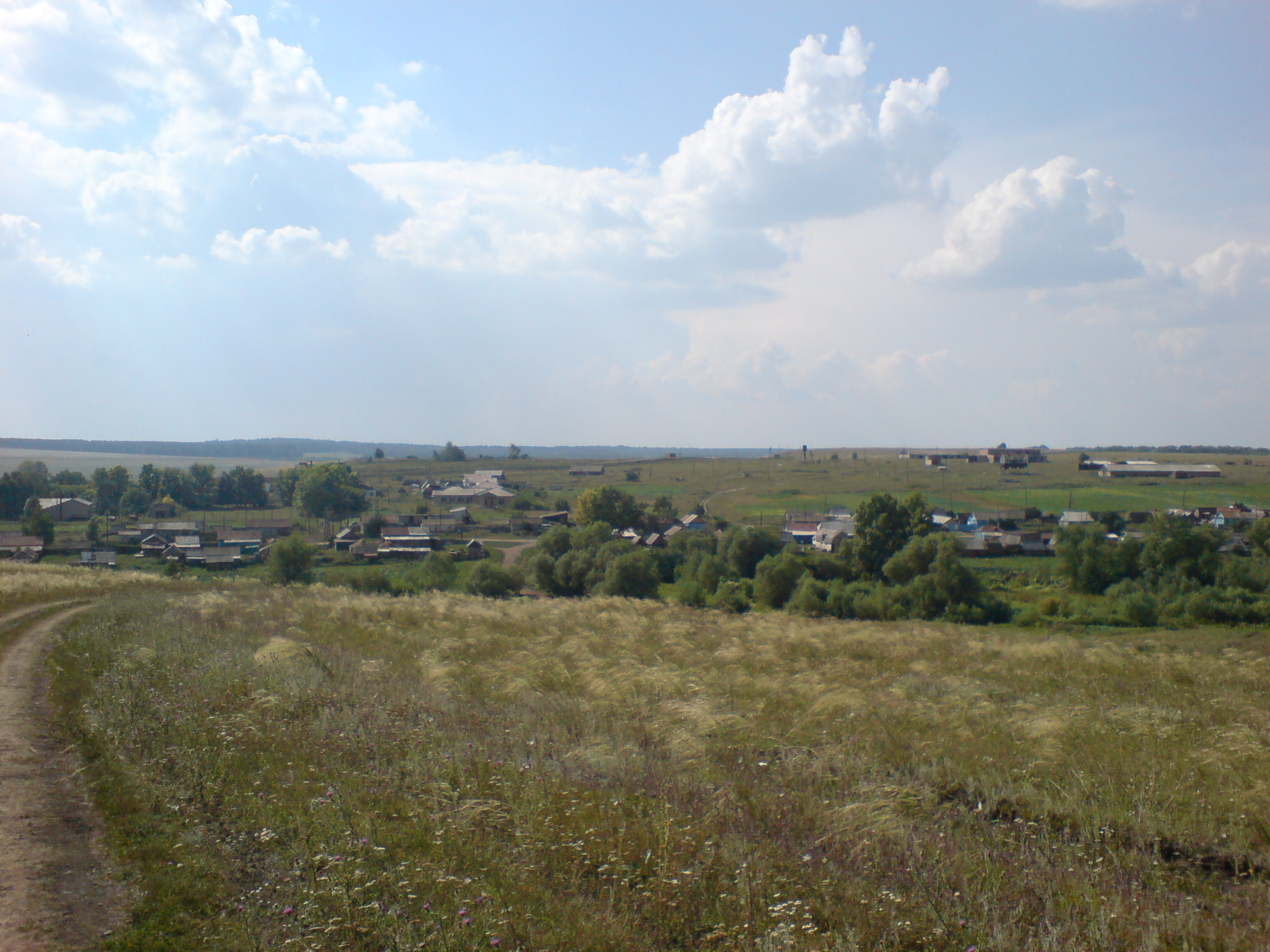 Нижний Курмей